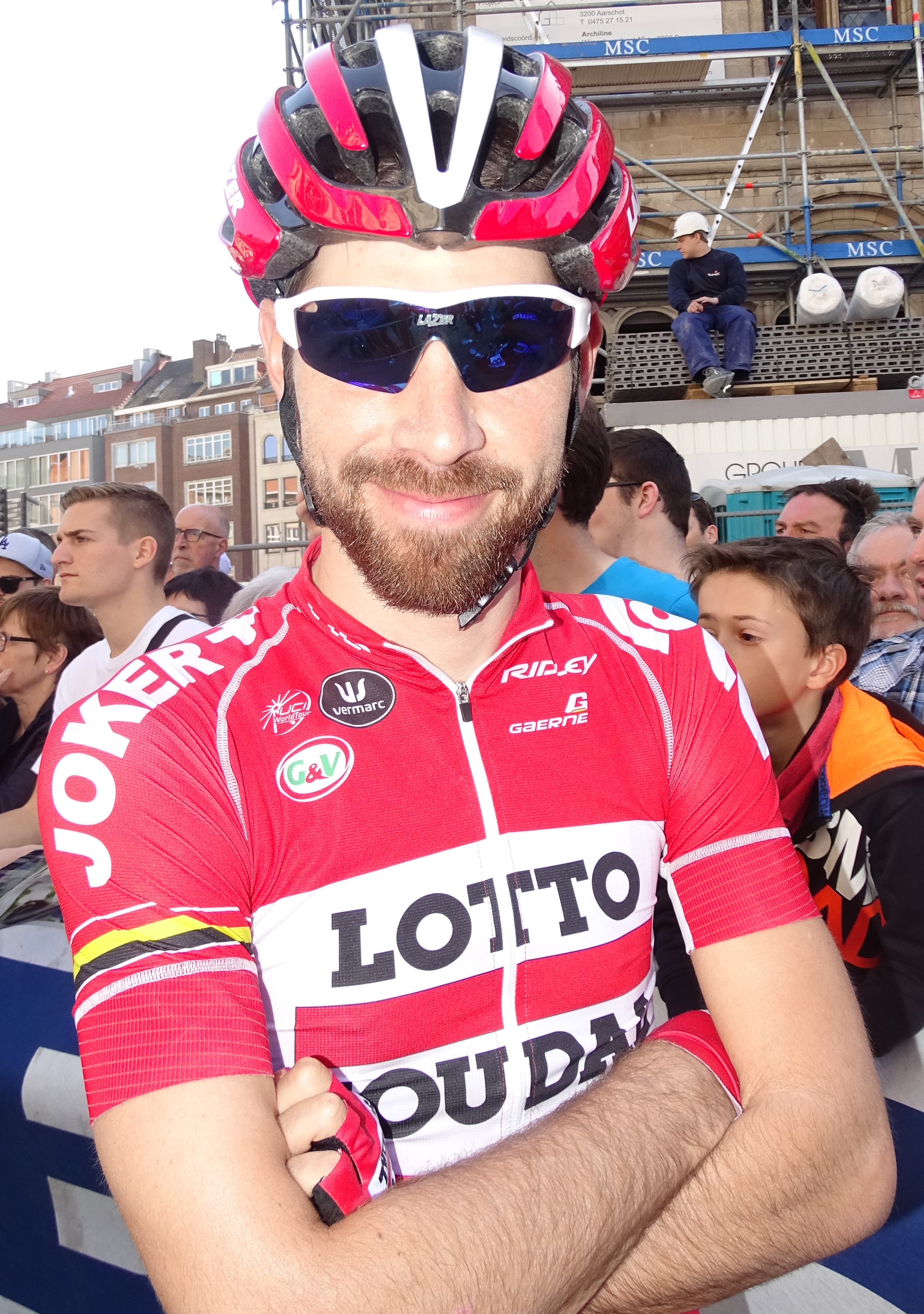 Reportage réalisé le mercredi 15 avril à l'occasion du départ de la Flèche brabançonne 2015 à Louvain, Belgique.